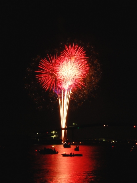 2007年 木更津港まつりの花火大会で撮影した打ち上げ花火